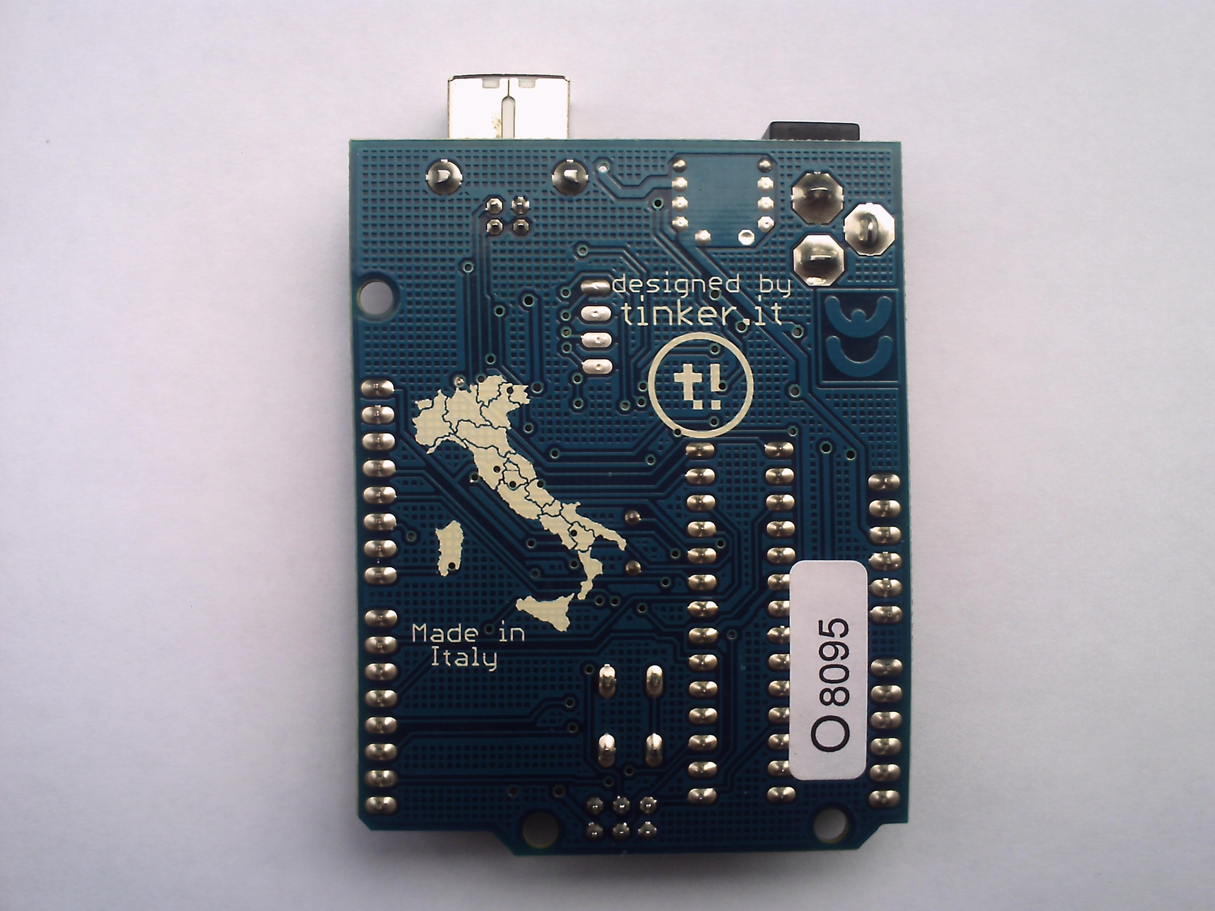 La parte posteriore del processore Arduino Duemilanove.